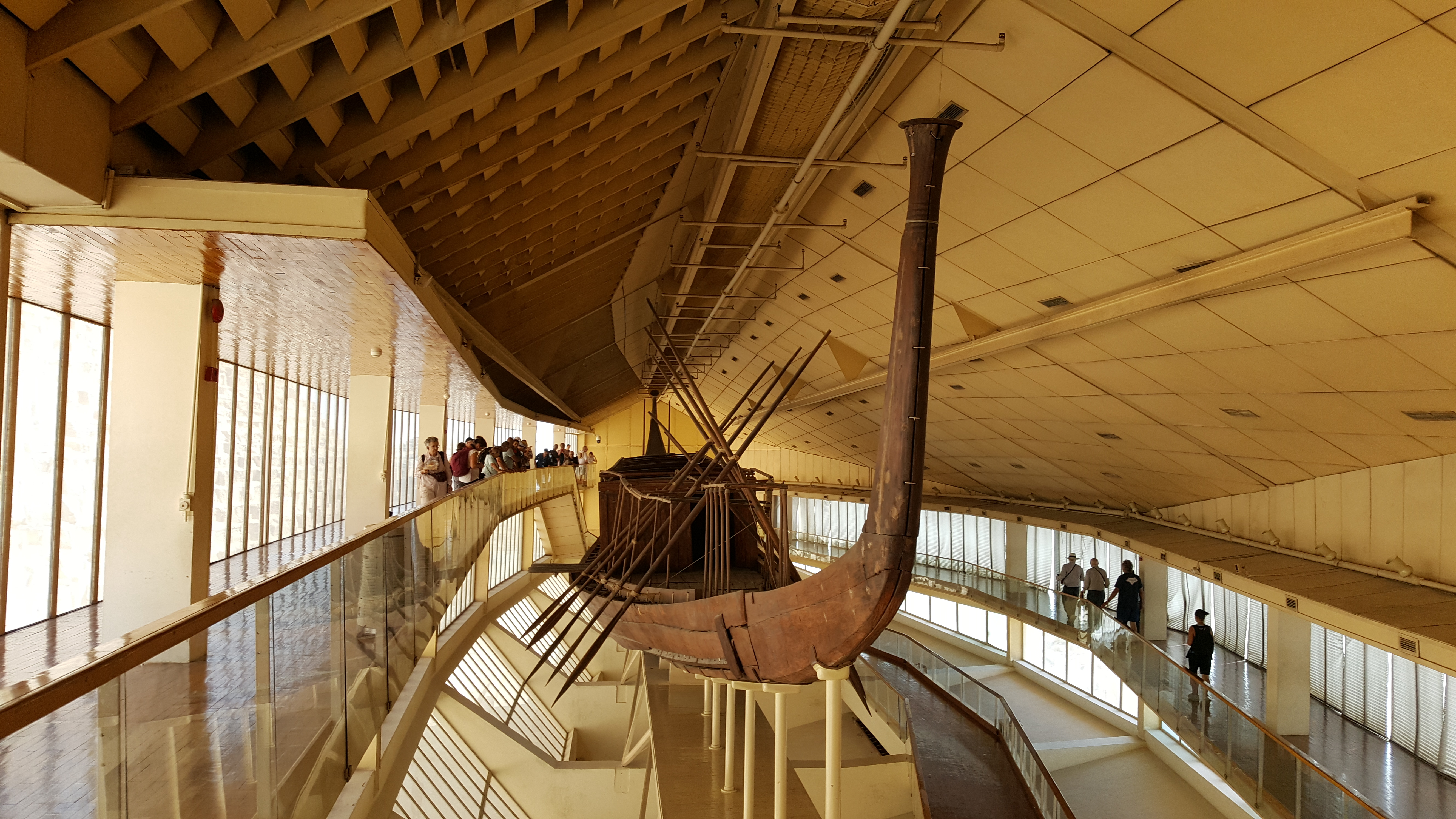 Khufu ship